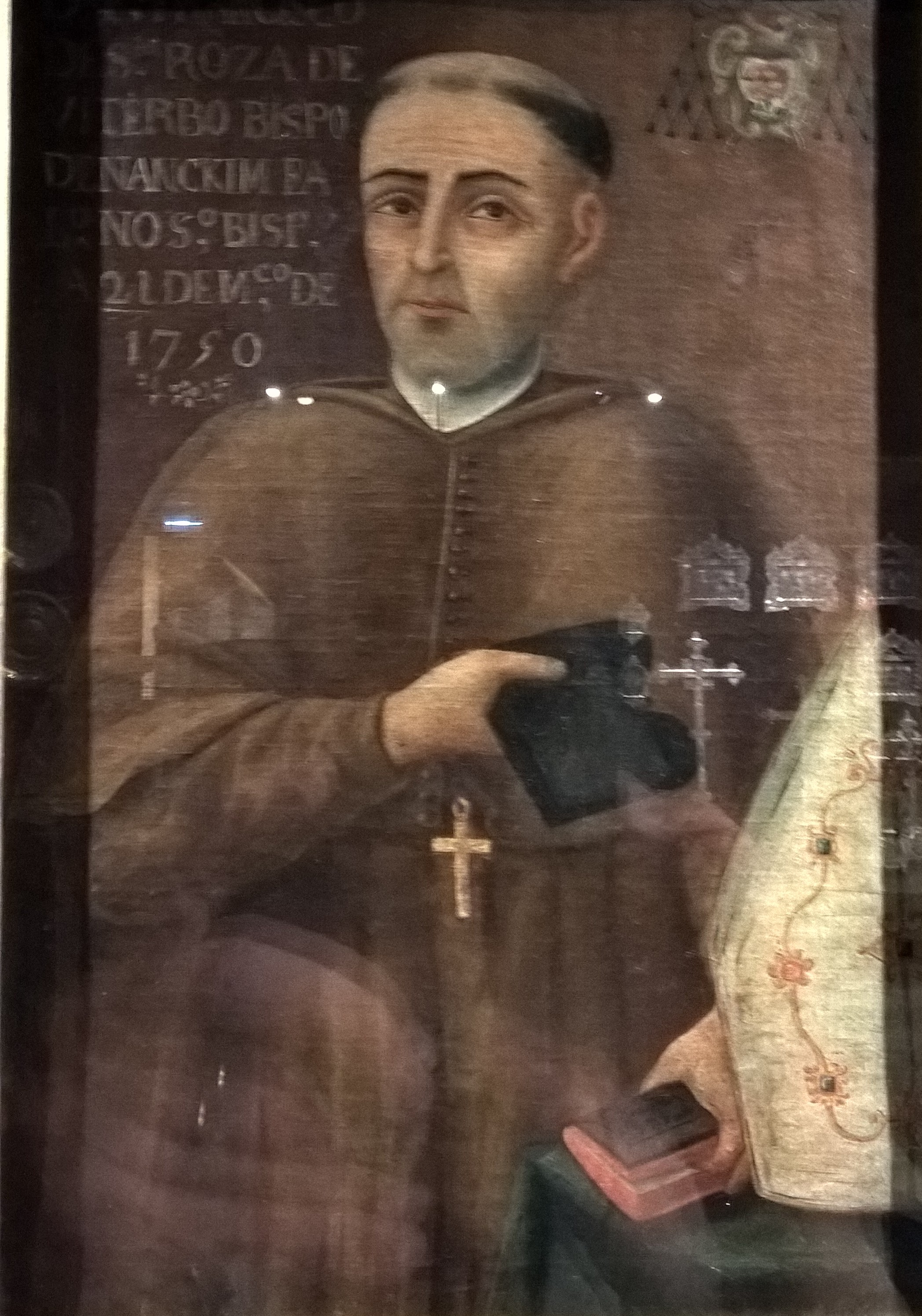 "Retrato de Frei Francisco de Santa Rosa de Viterbo", óleo sobre tela de Autor desconhecido, século XVIII, na Fundação Oriente.